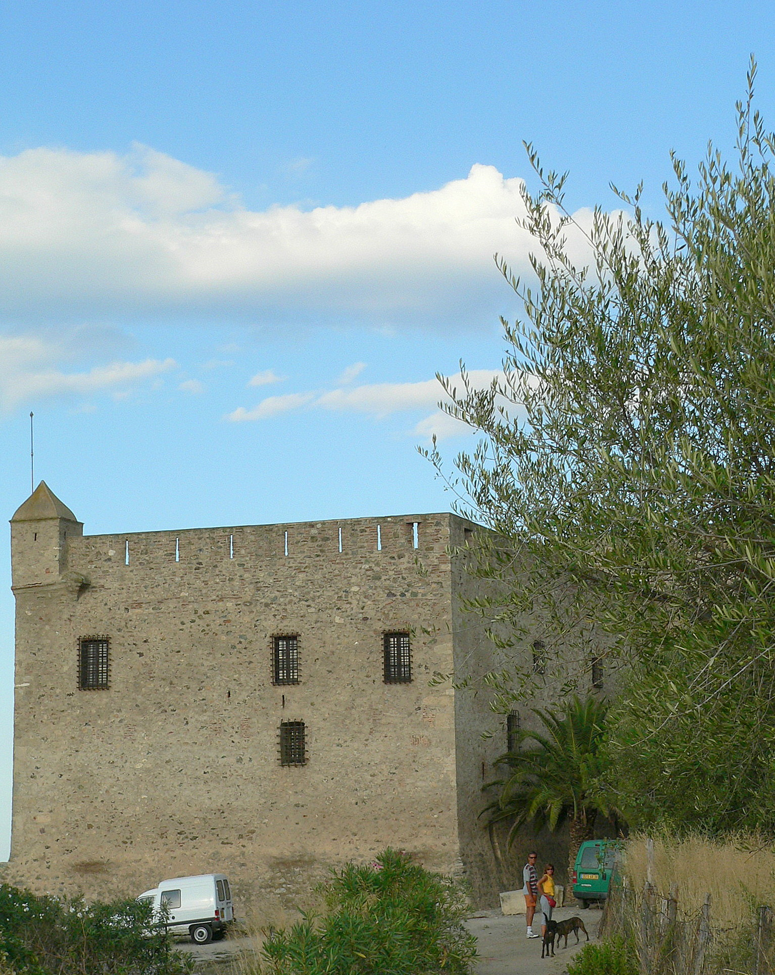 Fort de Matra Ce fort abrite le Musée départemental d'archéologie Jérôme Carcopino Aleria, Haute-Corse